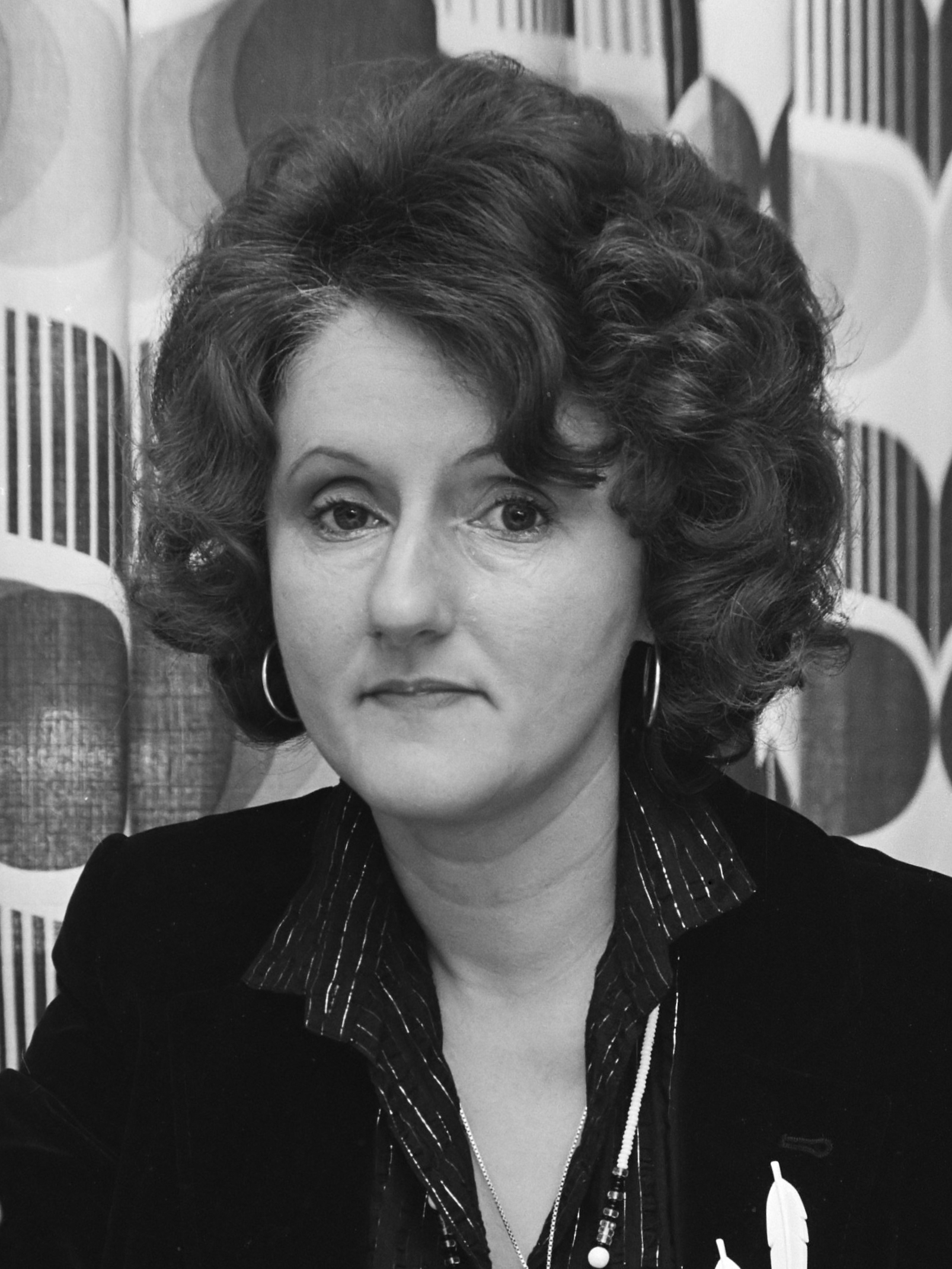 Tweede Kamerlid mevrouw Jabaaij (PvdA) voert actie tegen slecht eten in Tweede Kamerrestaurants 12 mei 1980